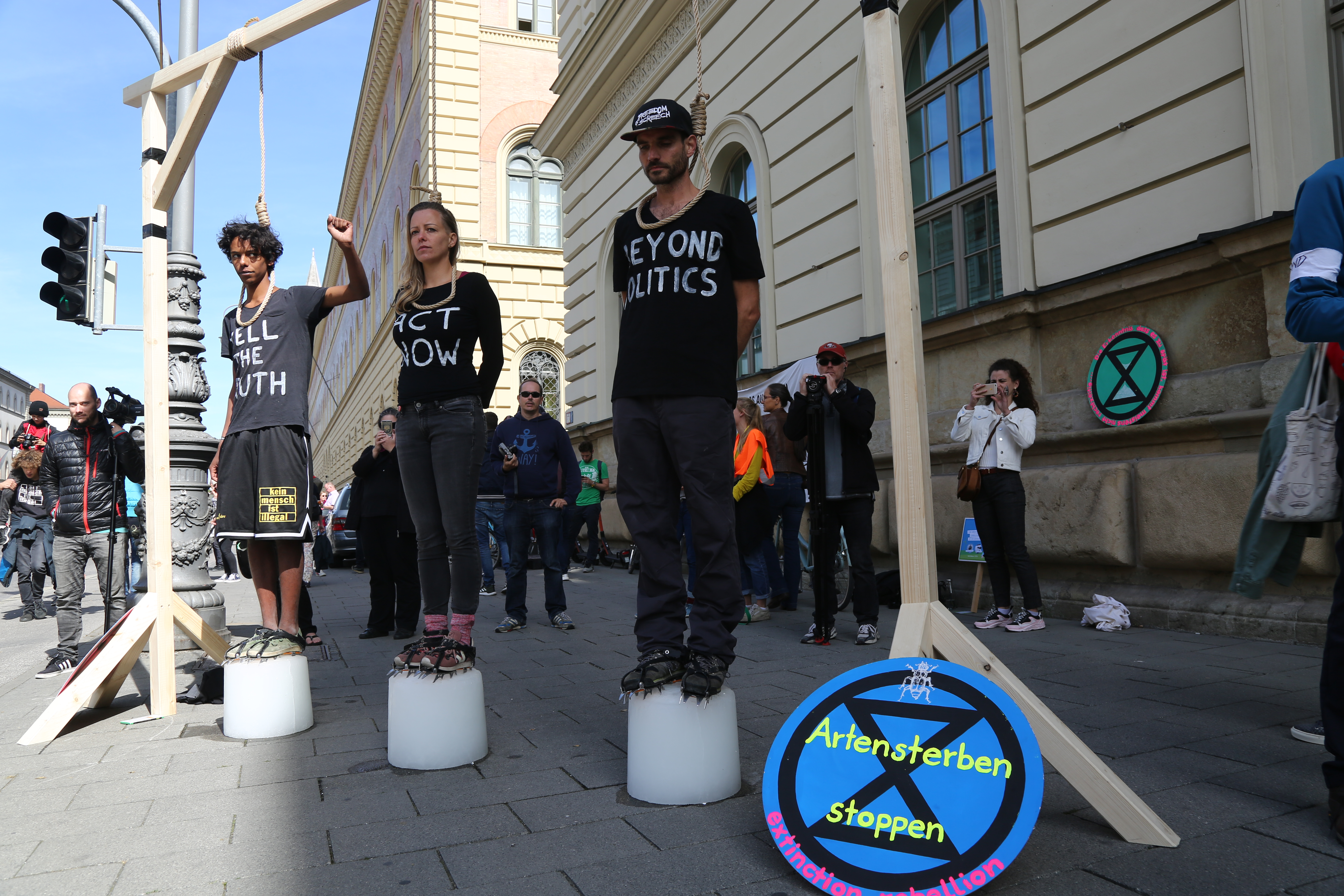 Extinction Rebellion München auf der Fridays-for-Future-Demo in München, 2019-09-20.